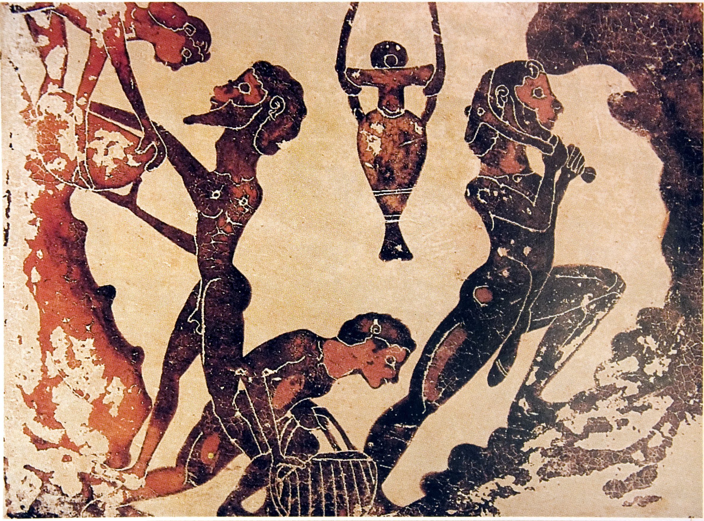 Esclaves travaillant dans une mine. Peinture sur plaquette en terre cuite corinthienne, Ve siècle av. J-C.